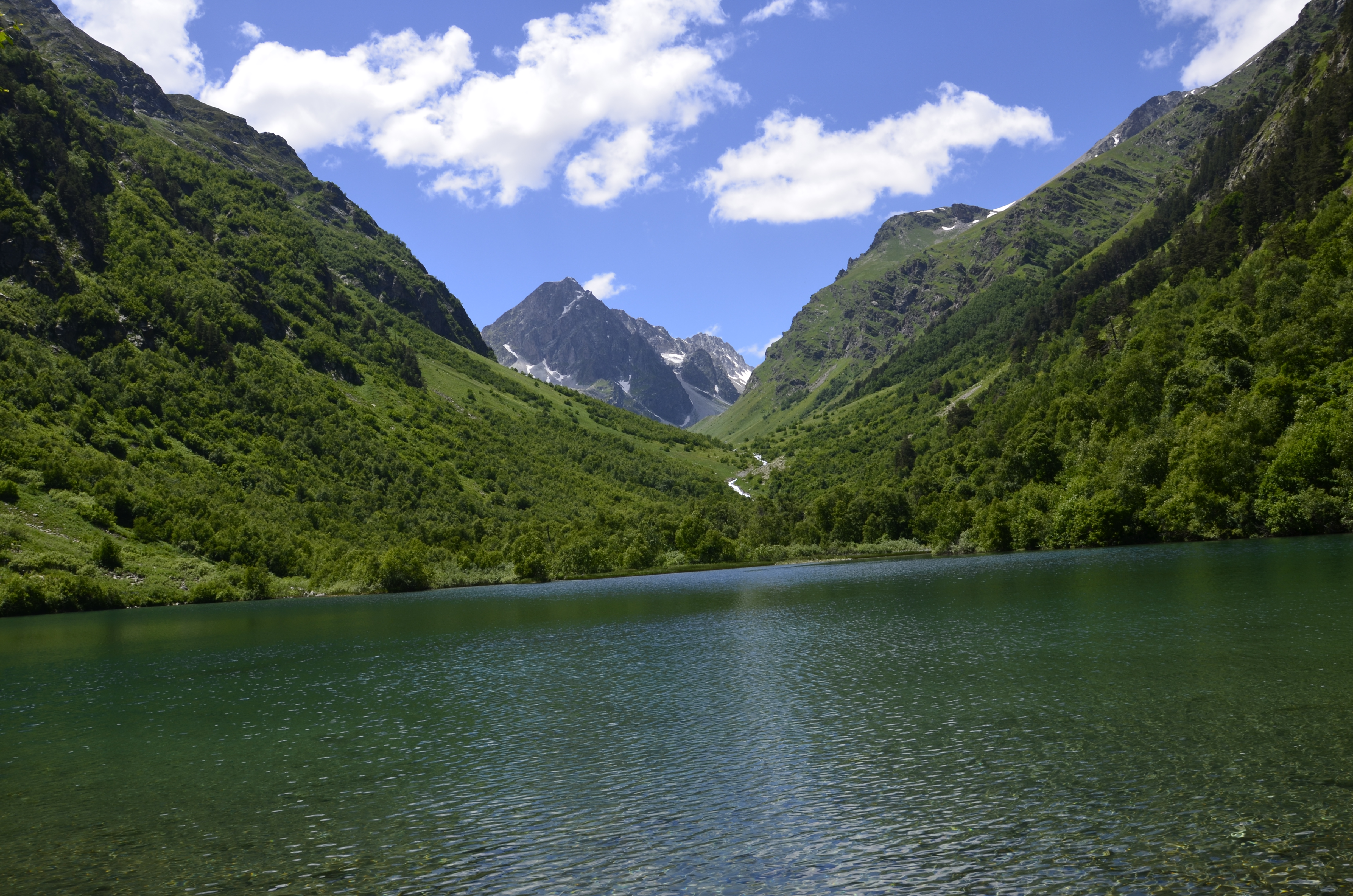 Третье озеро, Бадукские озёра, Тебердинский заповедник. This image is related to the protected area of Russia number 0900019